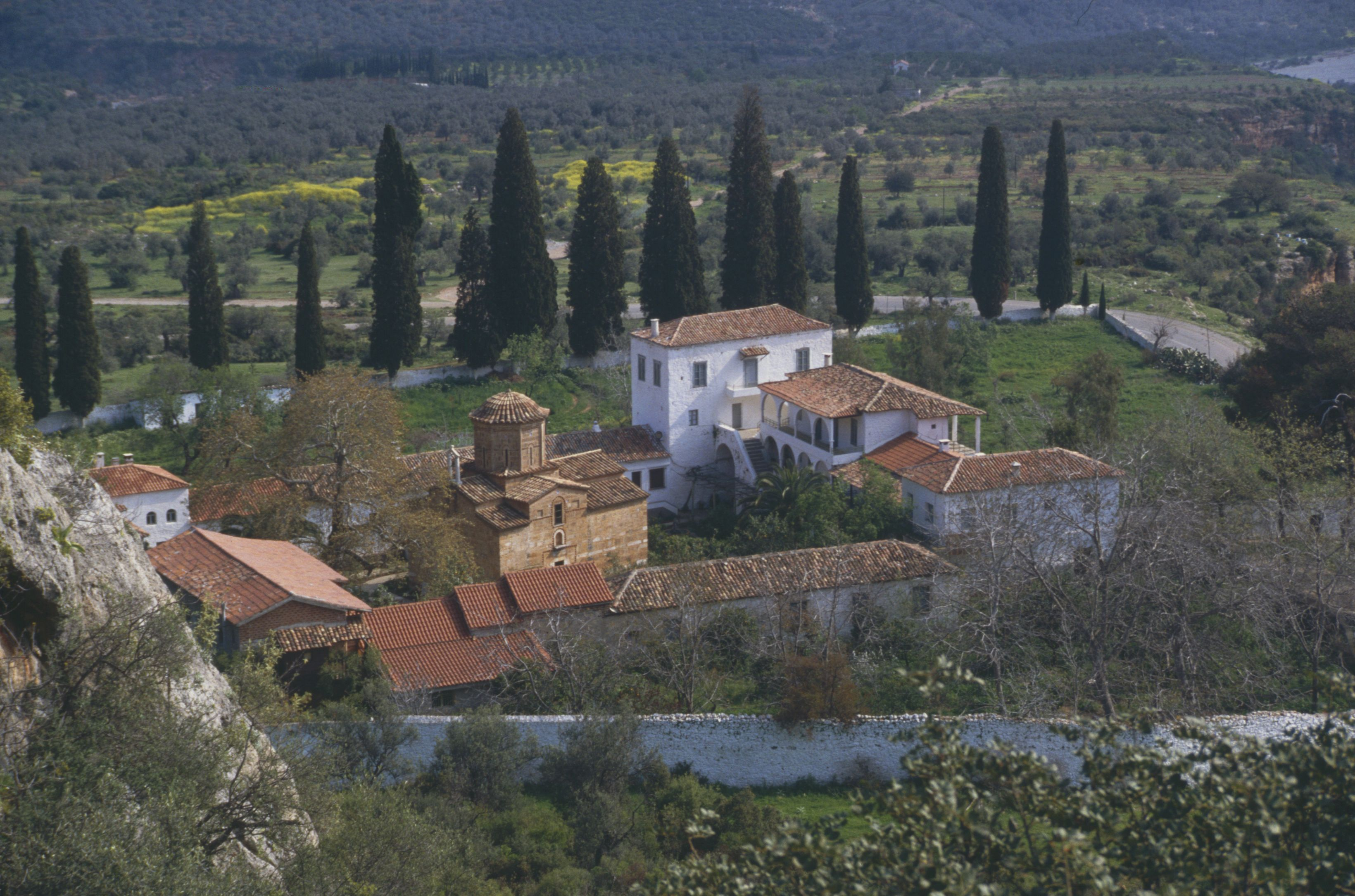 Klosteranlage Loukous/Peloponnes